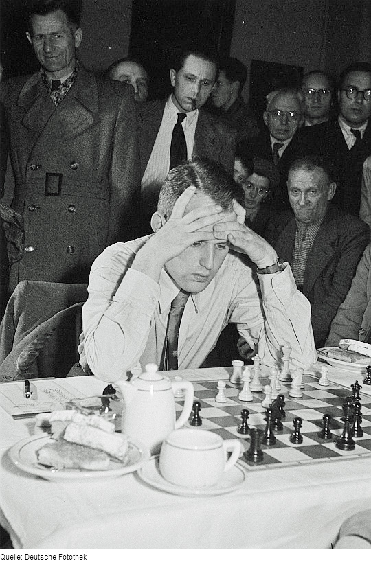 Original image description from the Deutsche Fotothek Wolfgang Unzicker konzentriert auf das Spielbrett schauend bei den Deutschen Schachmeisterschaften